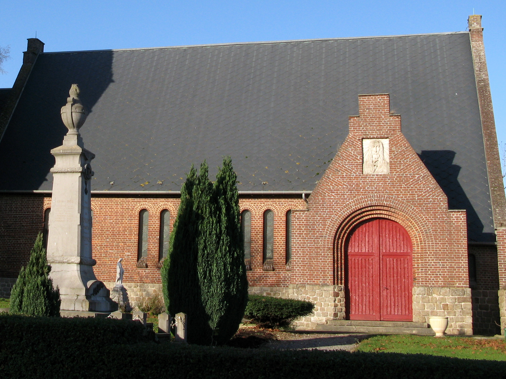 Vraignes-en-Vermandois (Somme, France) - L'église et le monument-aux-morts. .